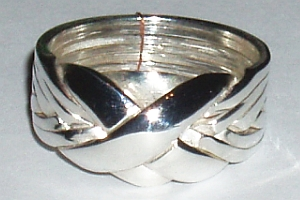 Description